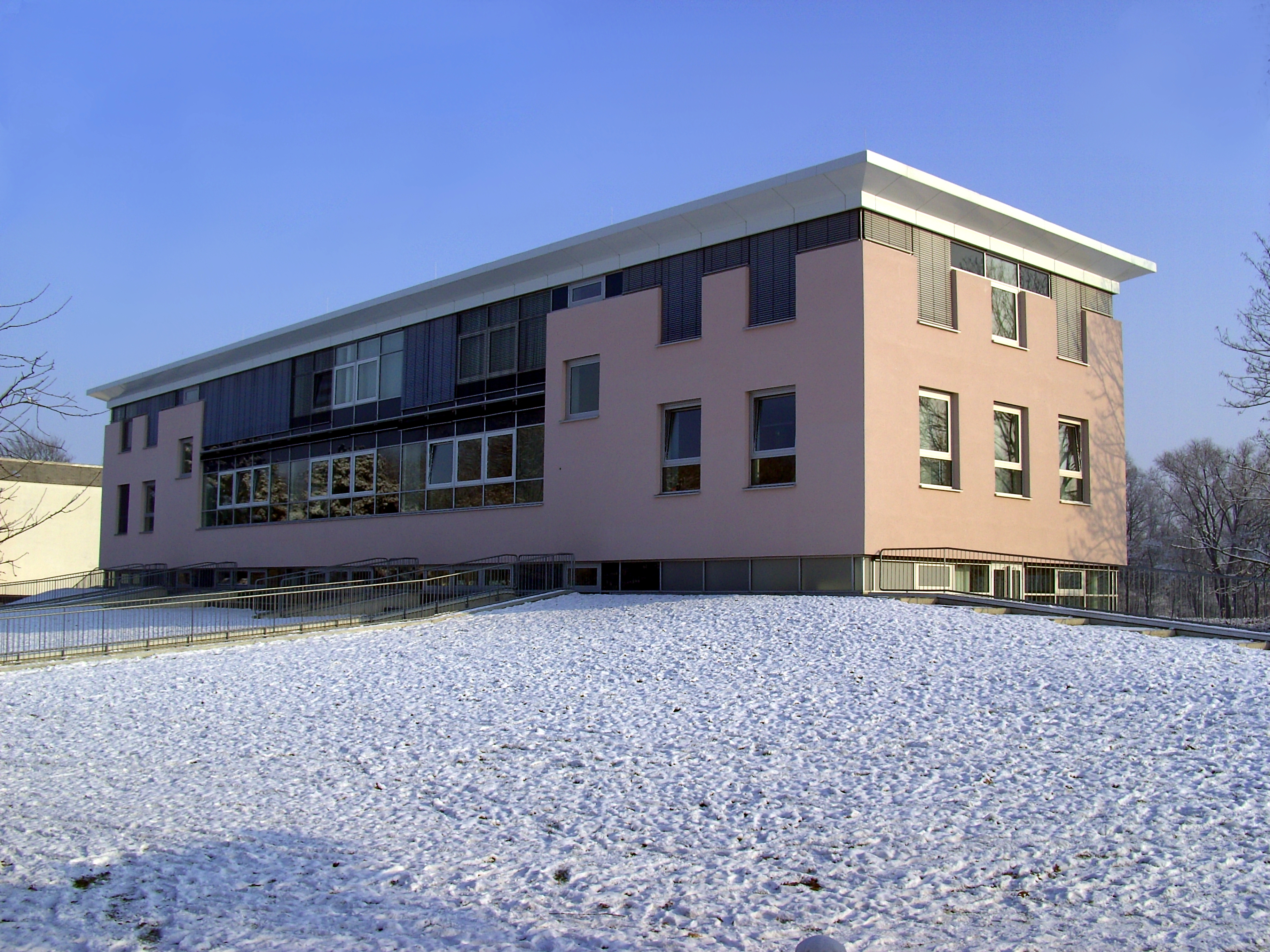 Gebäude des Sportinternat Knechtsteden in Domagen (NRW)